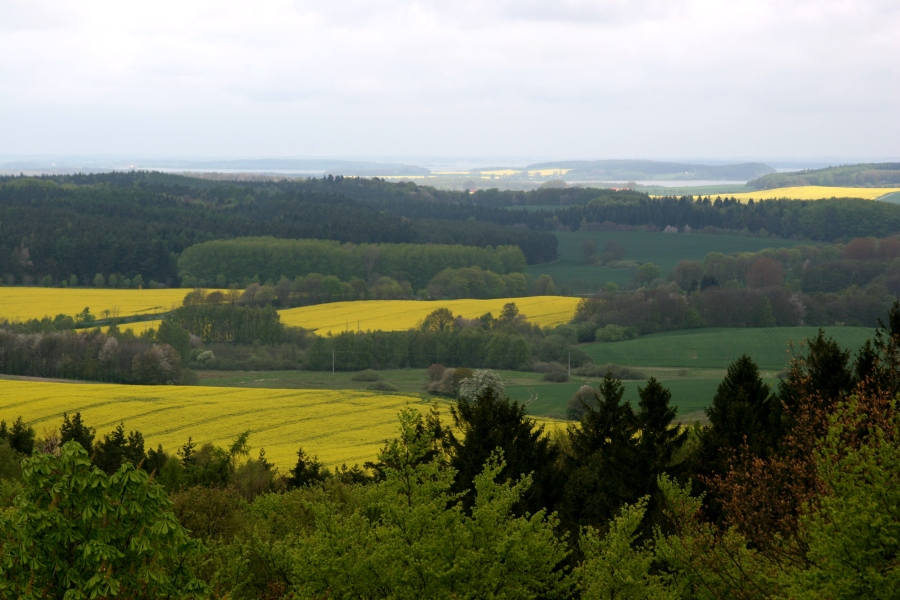 Bergen auf Rügen - Blick vom Rugard-Turm nach Nordost über den kleinen Jasmunder Bodden in Richtung Ostsee